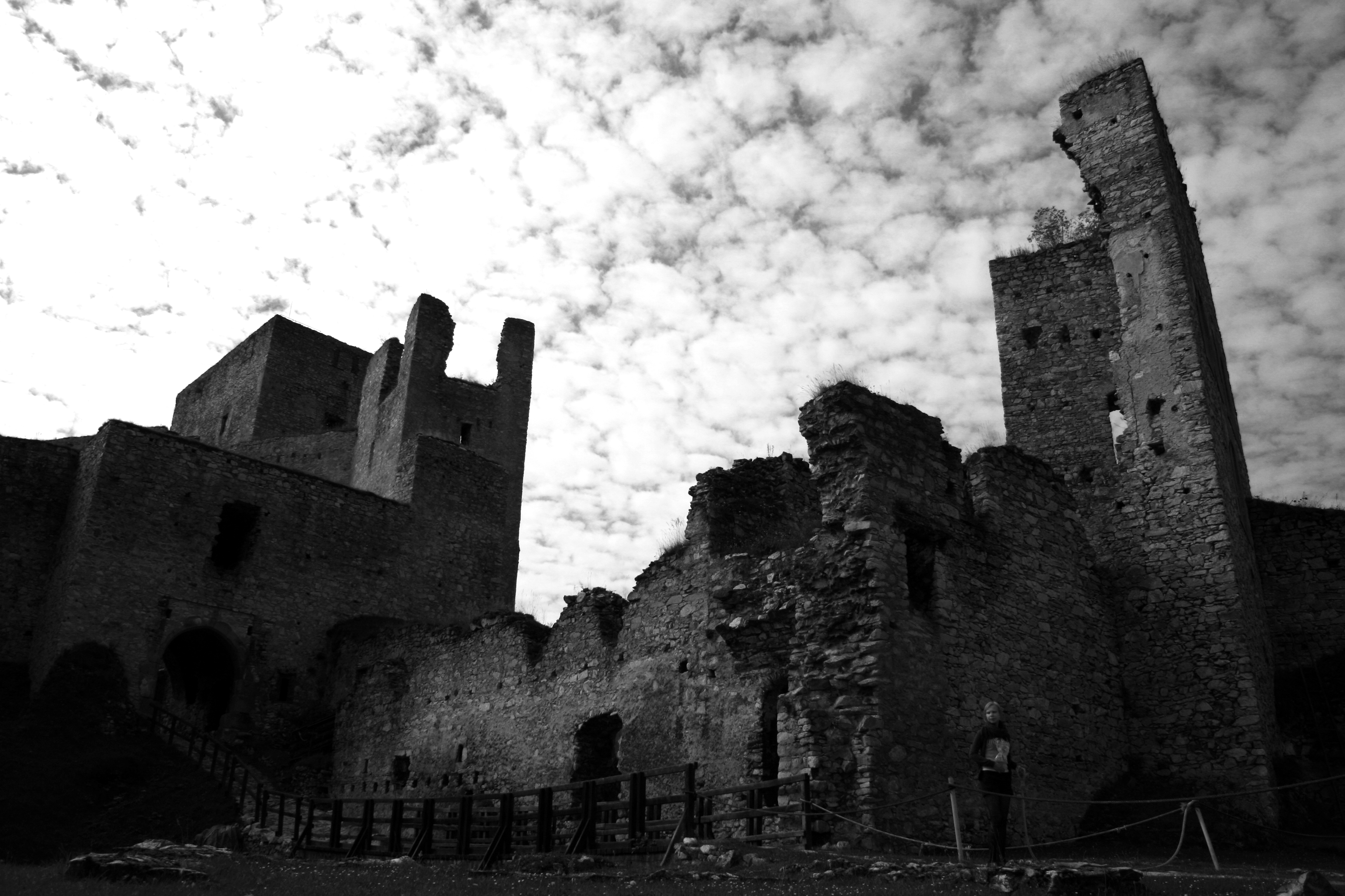 Hrad Rabí s hradním kostelem Nejsvětější Trojice, část stojící, část zřícenina a archeologické stopy (Rabí), na skalnatém výchozu kopce, Rabí